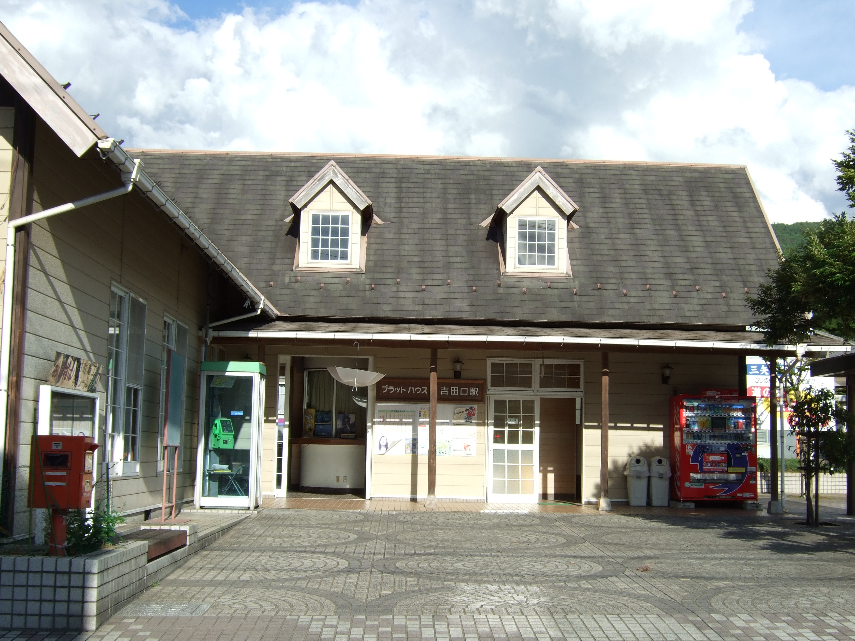 吉田口駅駅前で撮影。